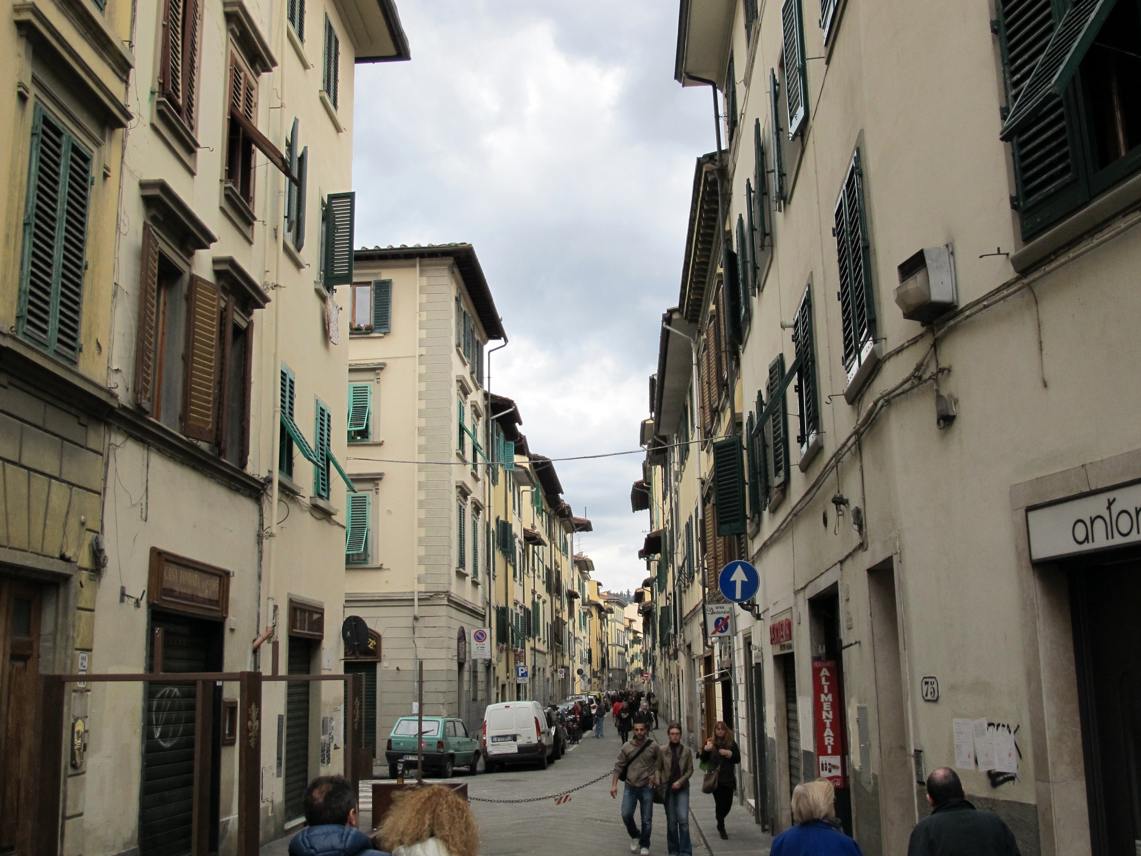 Via de' macci, veduta vicino s. ambrogio